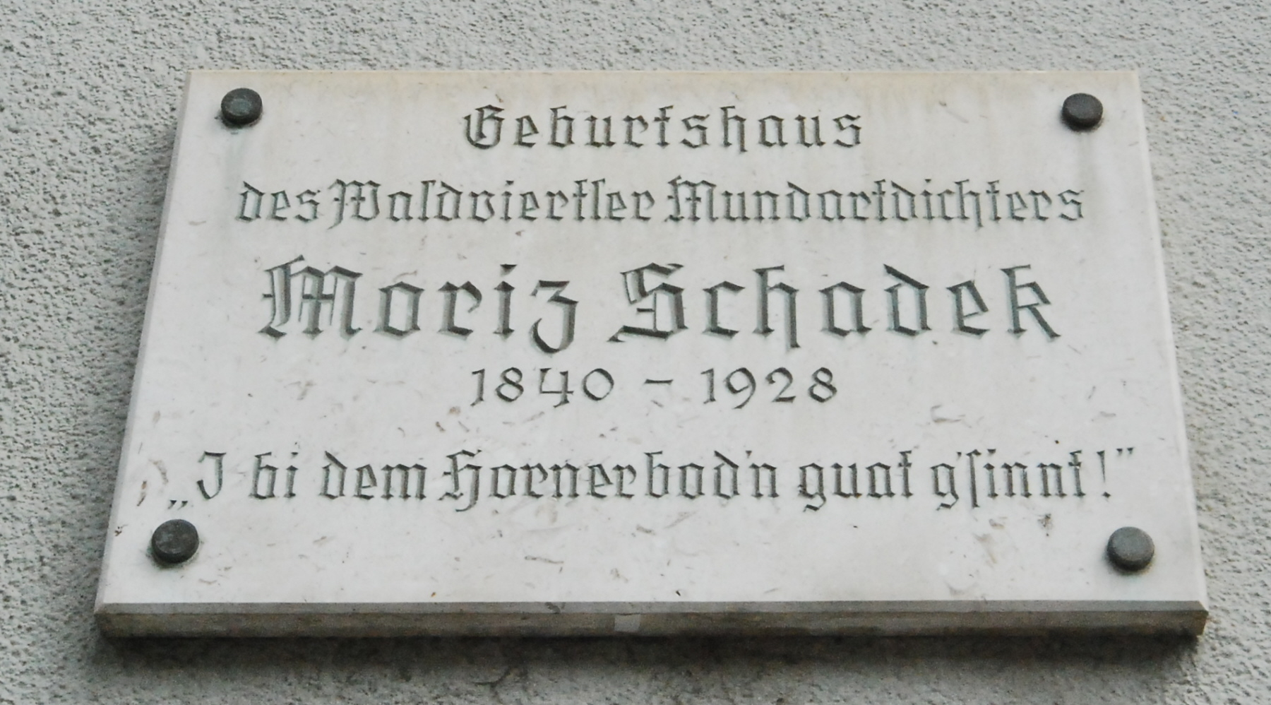 Gedenktafel für den Dichter Moriz Schadek in Horn in Niederösterreich